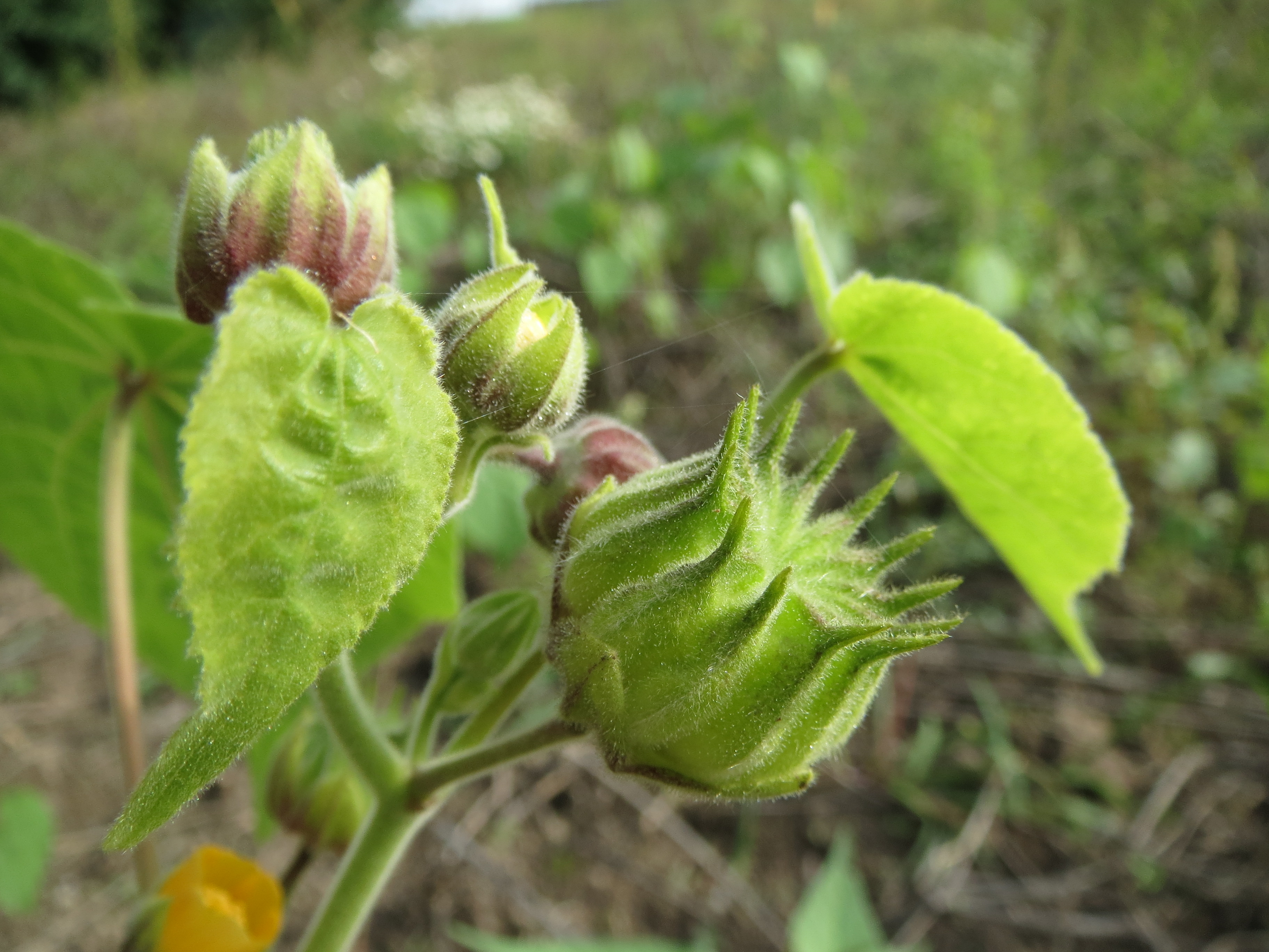 Samtpappel (Abutilon theophrasti) im Hockenheimer Rheinbogen